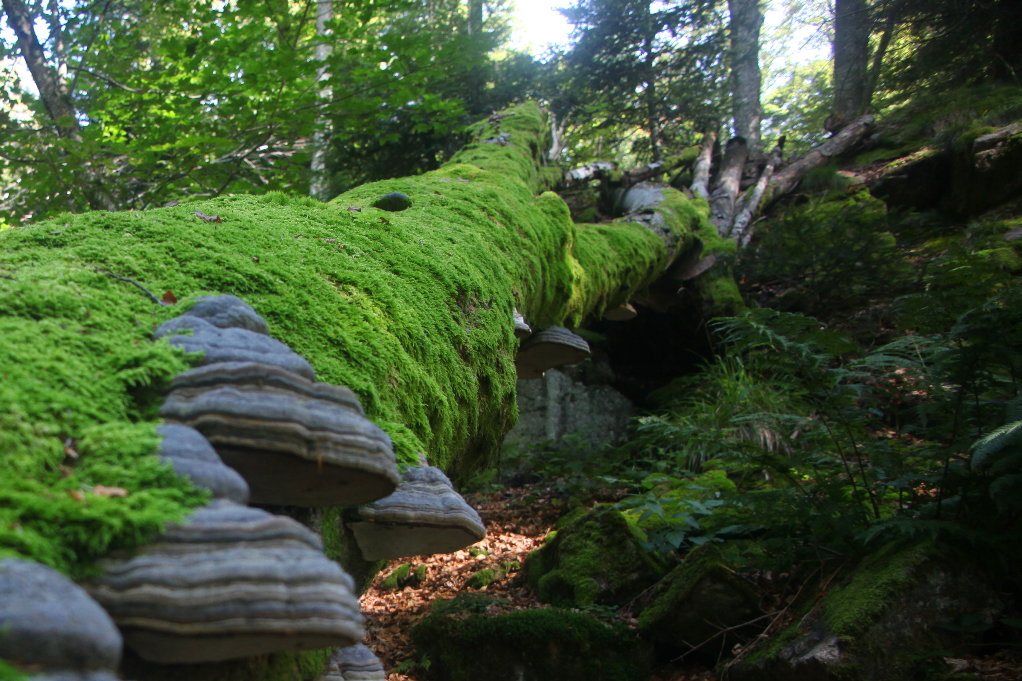 Quelques polypores sur un tronc moussu dans la partie en réserve biologique intégrale de la RNN des Ballons Comtois.